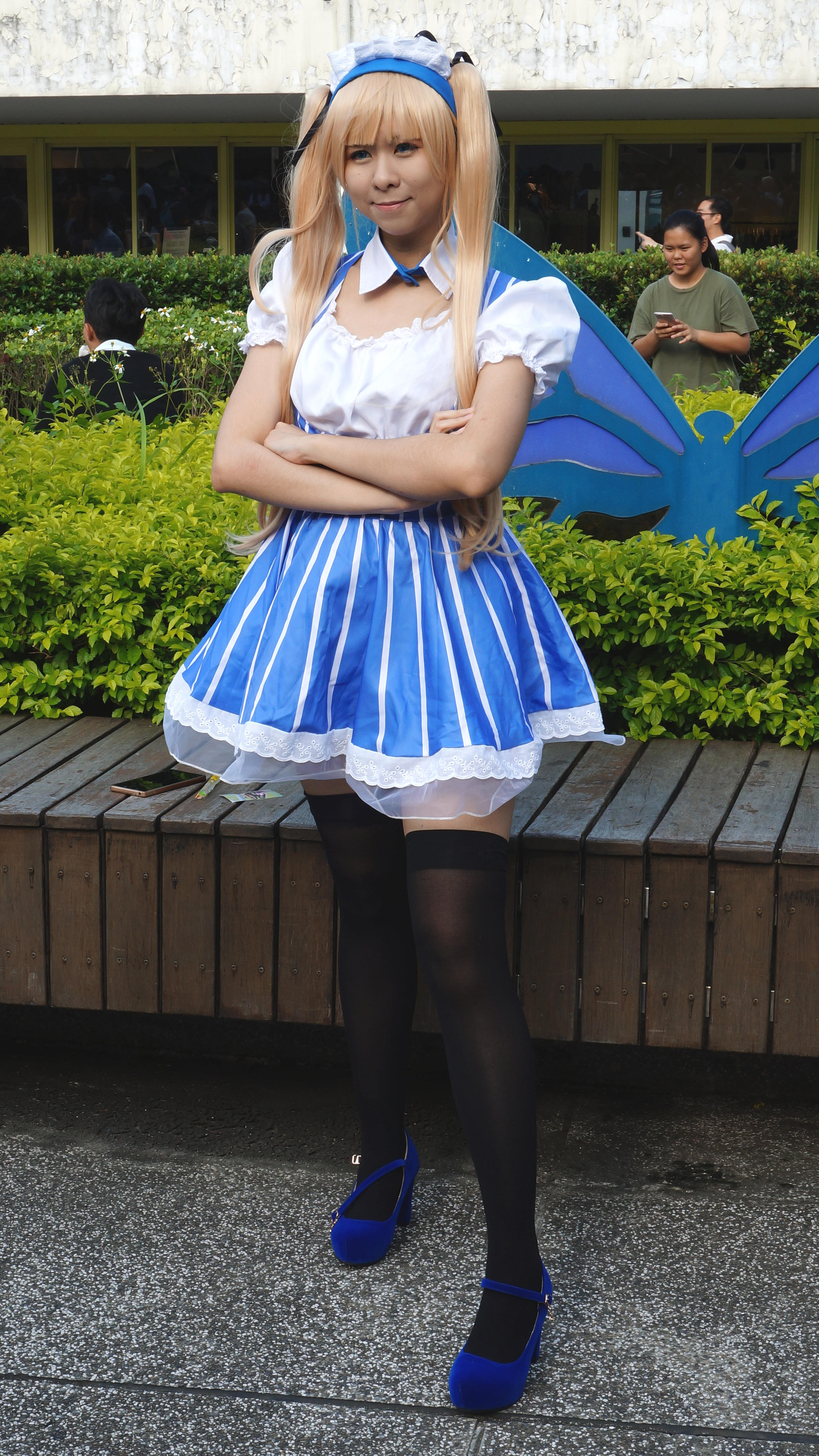 第六屆漫創地平線，女僕裝《不起眼女主角培育法》澤村·史賓瑟·英梨梨cosplayer。